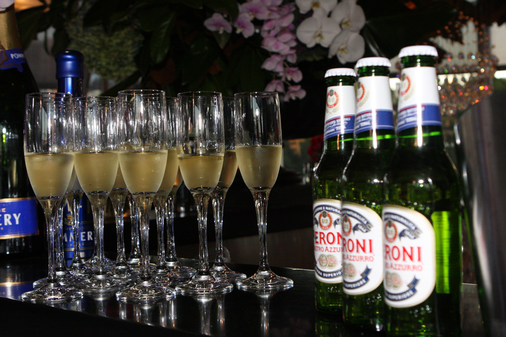 Collette Dinnagan Award Winner: Mercedes - Benz Star Lounge, Mercedes Benz Fashion Week Australian Fashion Laureate